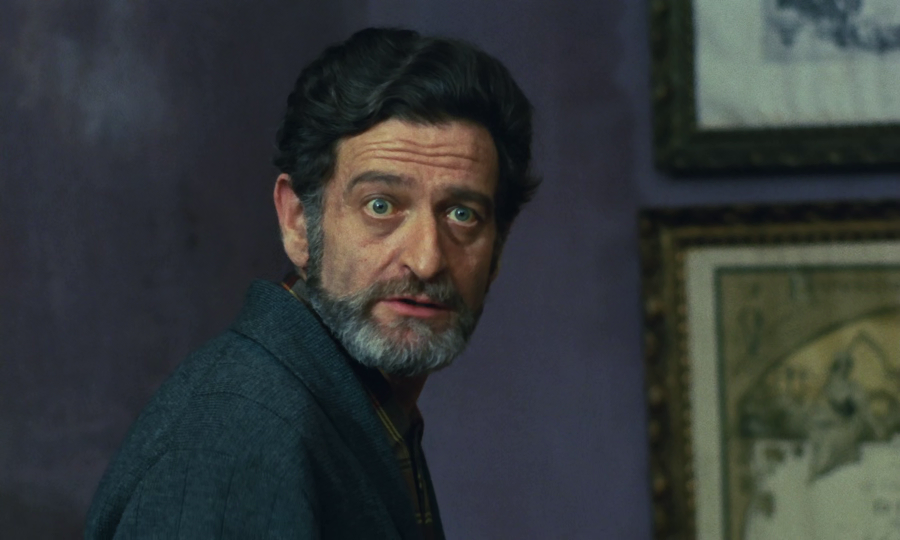 Scena dal film Sequestro di persona (1968)